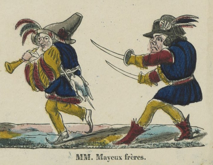 Deux personnages typiques du Carnaval de Paris. Détail d'une planche gravée en couleurs.